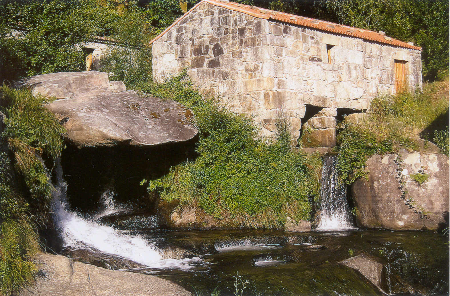 Caldas de Reis, Galicia, Spain